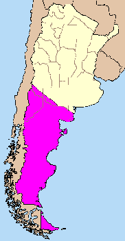 Ubicación de la Patagonia argentina Imagen creada por Usuario discusión:LadyInGrey